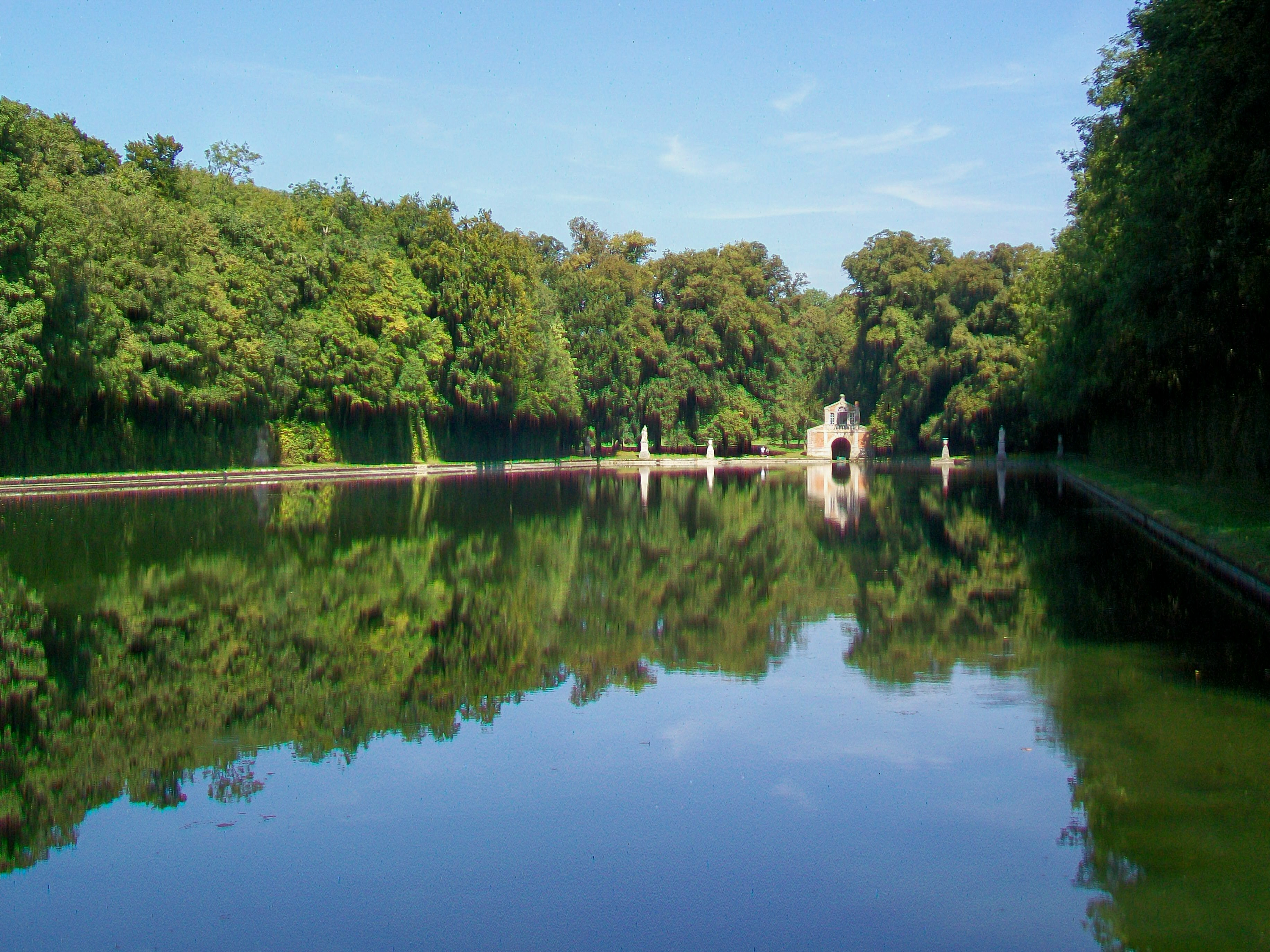 Le miroir d'eau de 1710 conçu selon le plan d'André Le Nôtré ; vue vers l'embarcadère au nord.